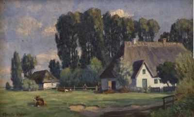 Friesenhaus auf Sylt, Öl auf Leinwand, signiert unten links, 28×45 cm